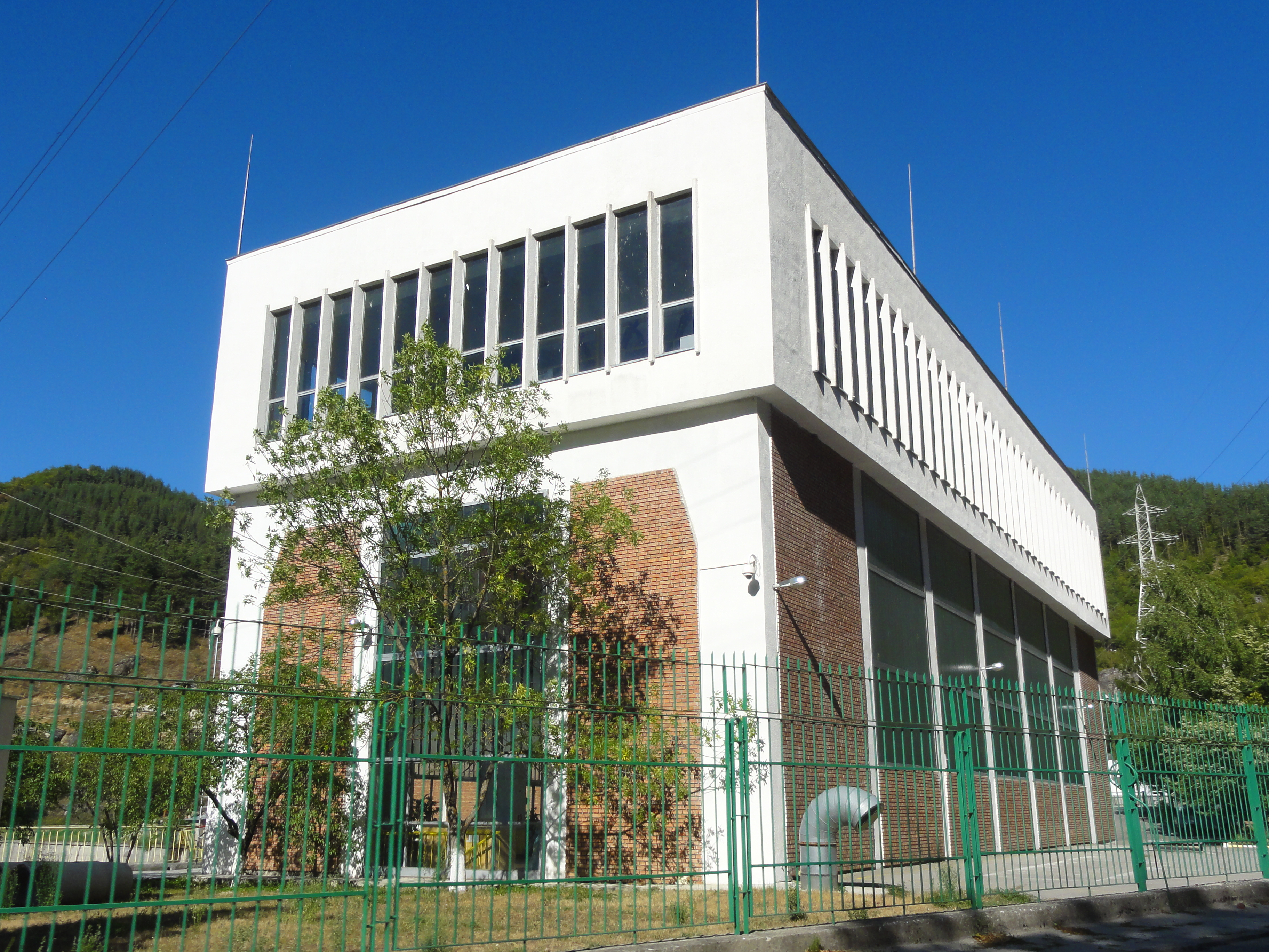 ВЕЦ Девин